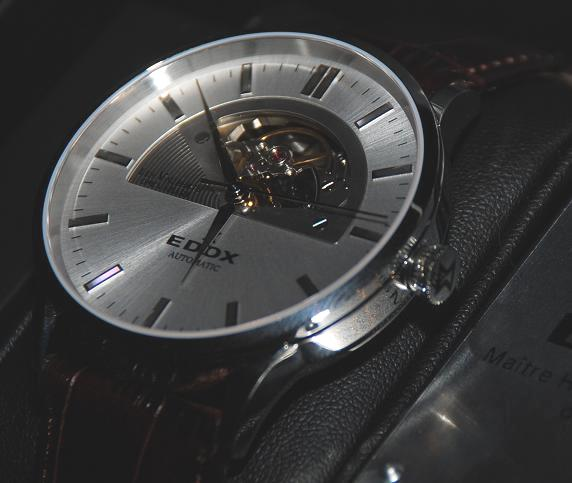 Edox horloge (Les Vauberts Open Heart)